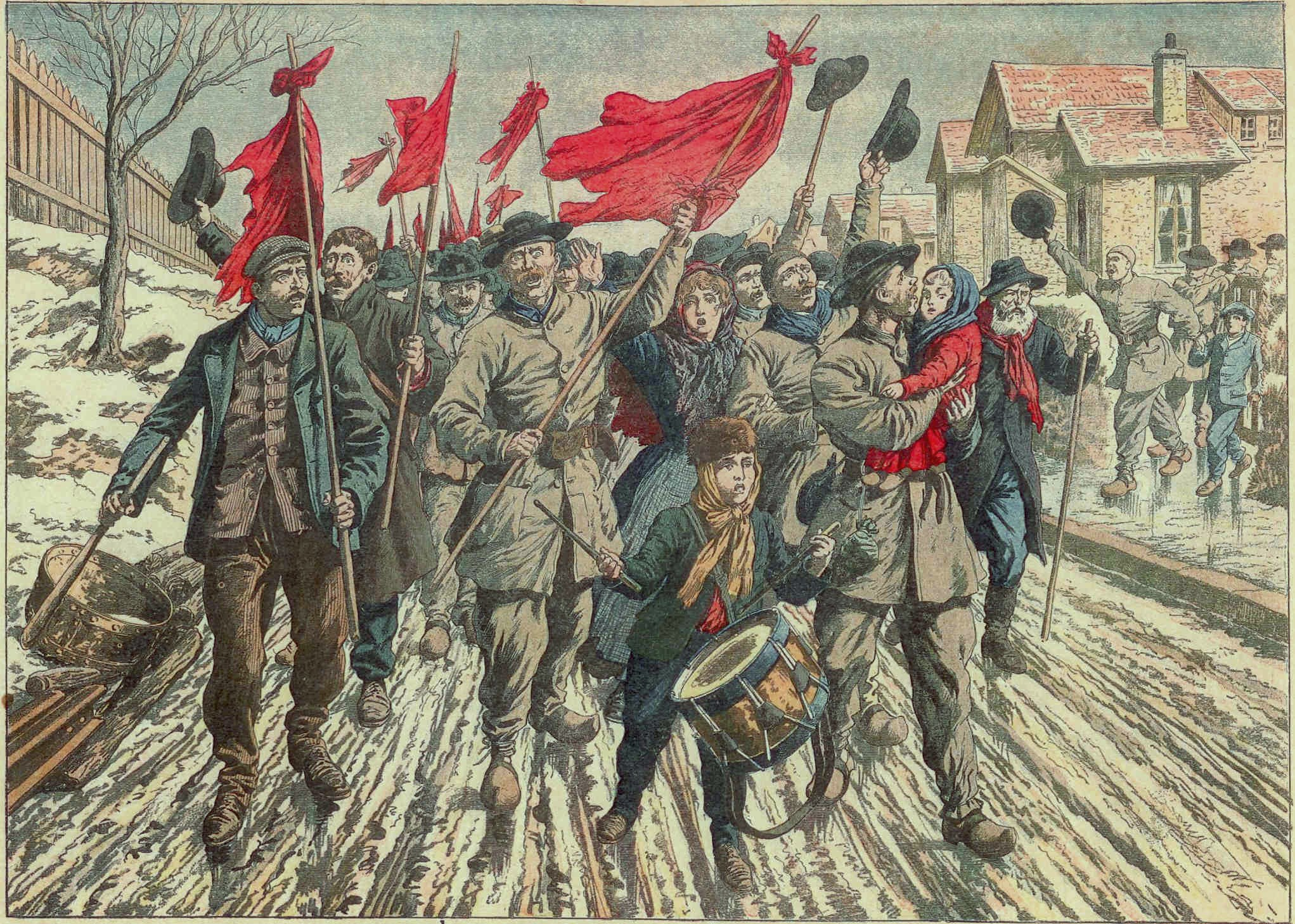 Le cortège des mineurs du Pas-de-Calais en grève parcourant les corons.